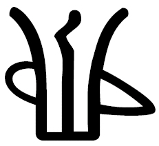 Luvi ligatúra, ḫatti+li, ḫattili, ḫattušili